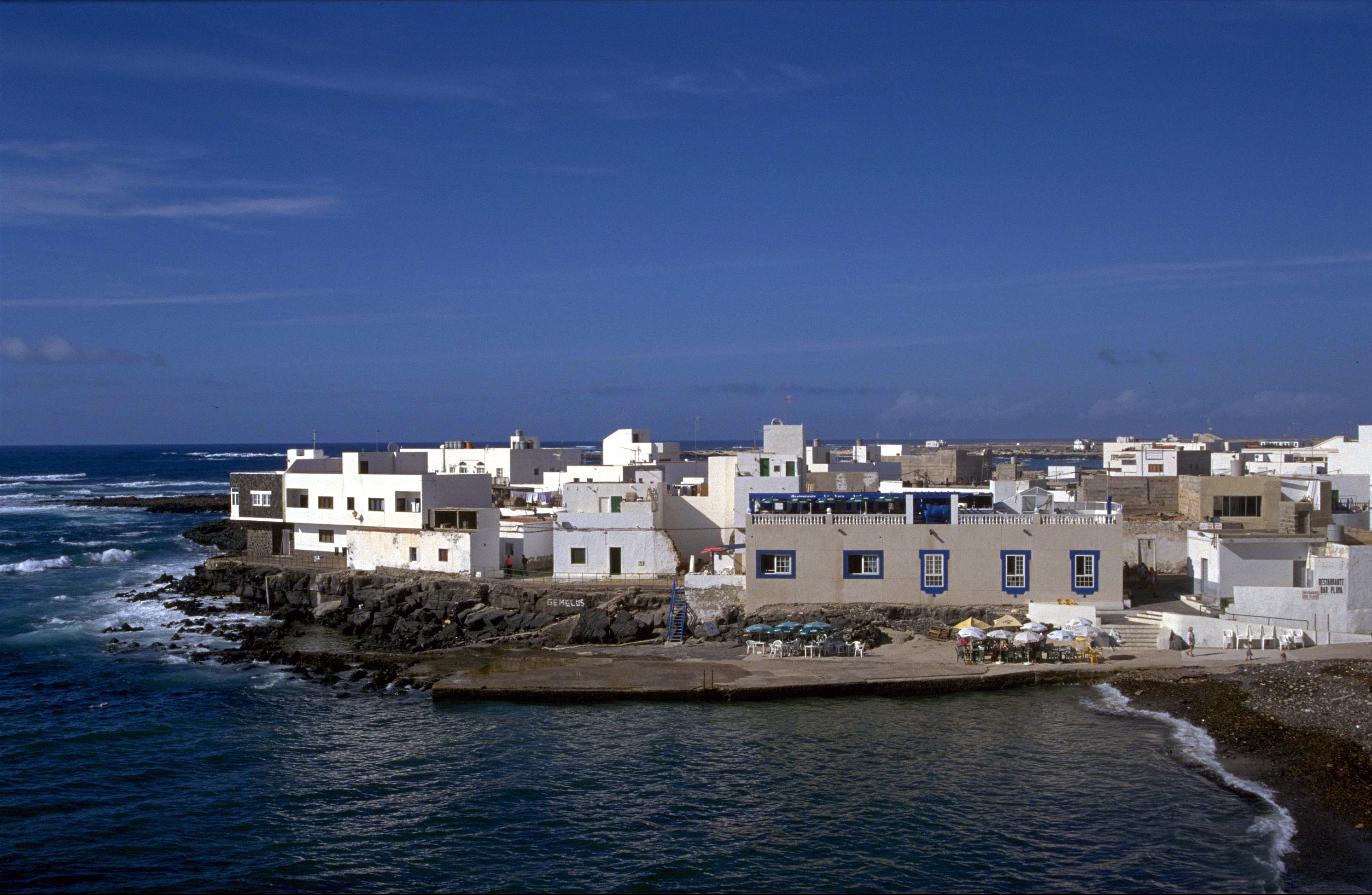 El Cotillo